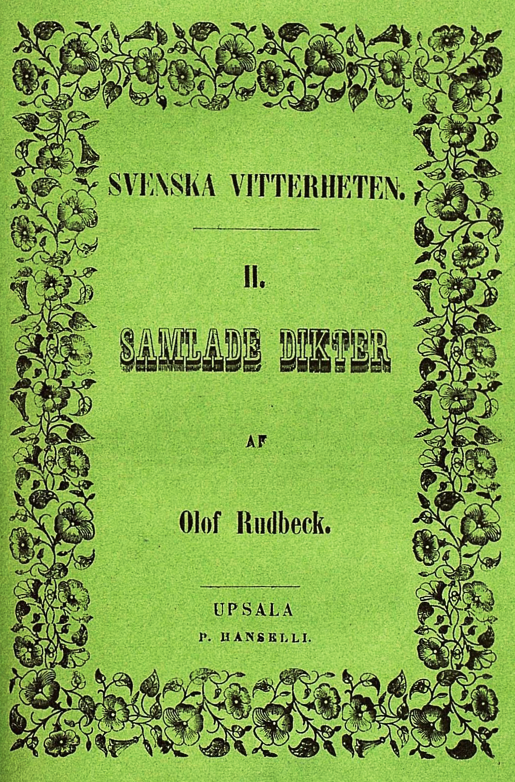 Cover of Svenska vitterheten. Part 2.